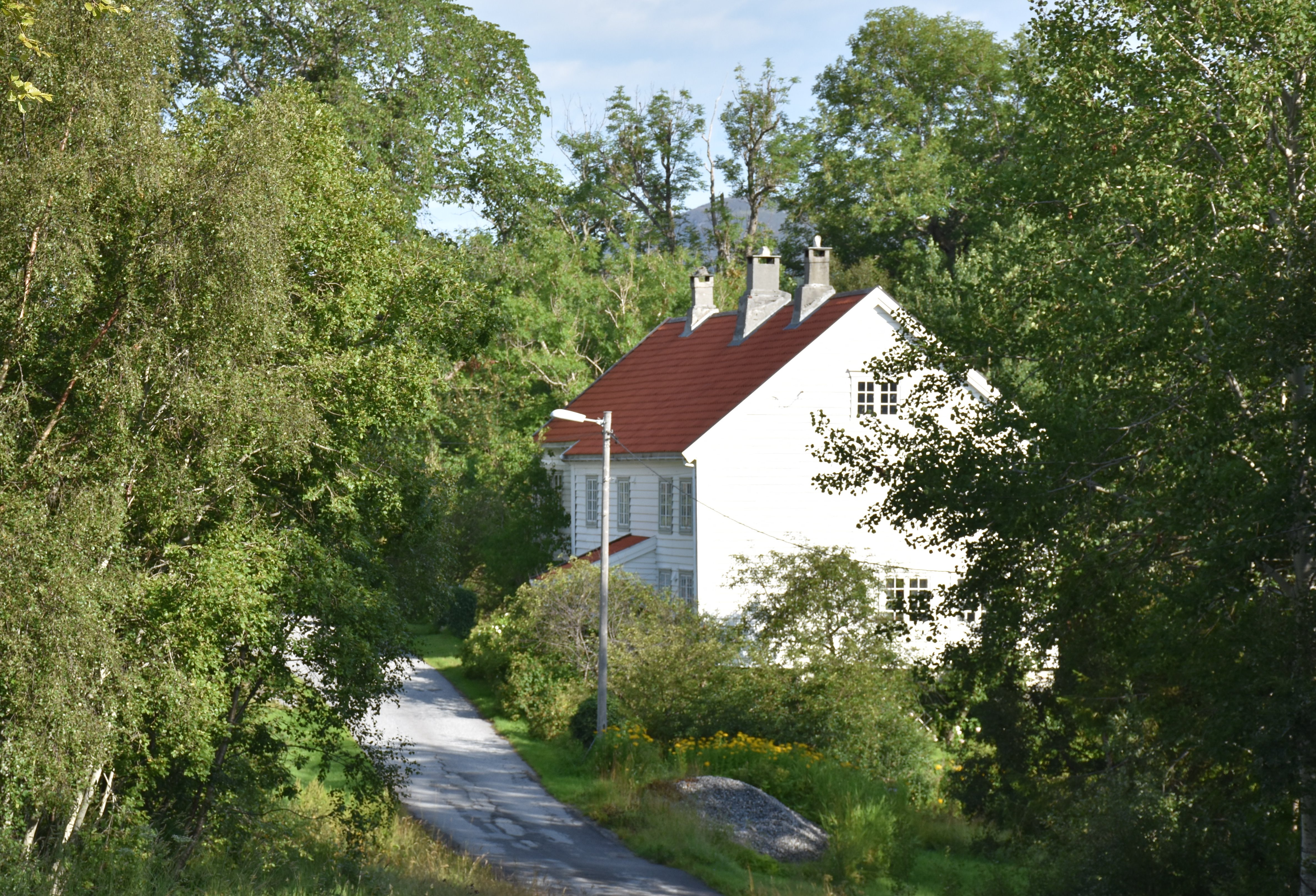 Herøy gamle prestegård